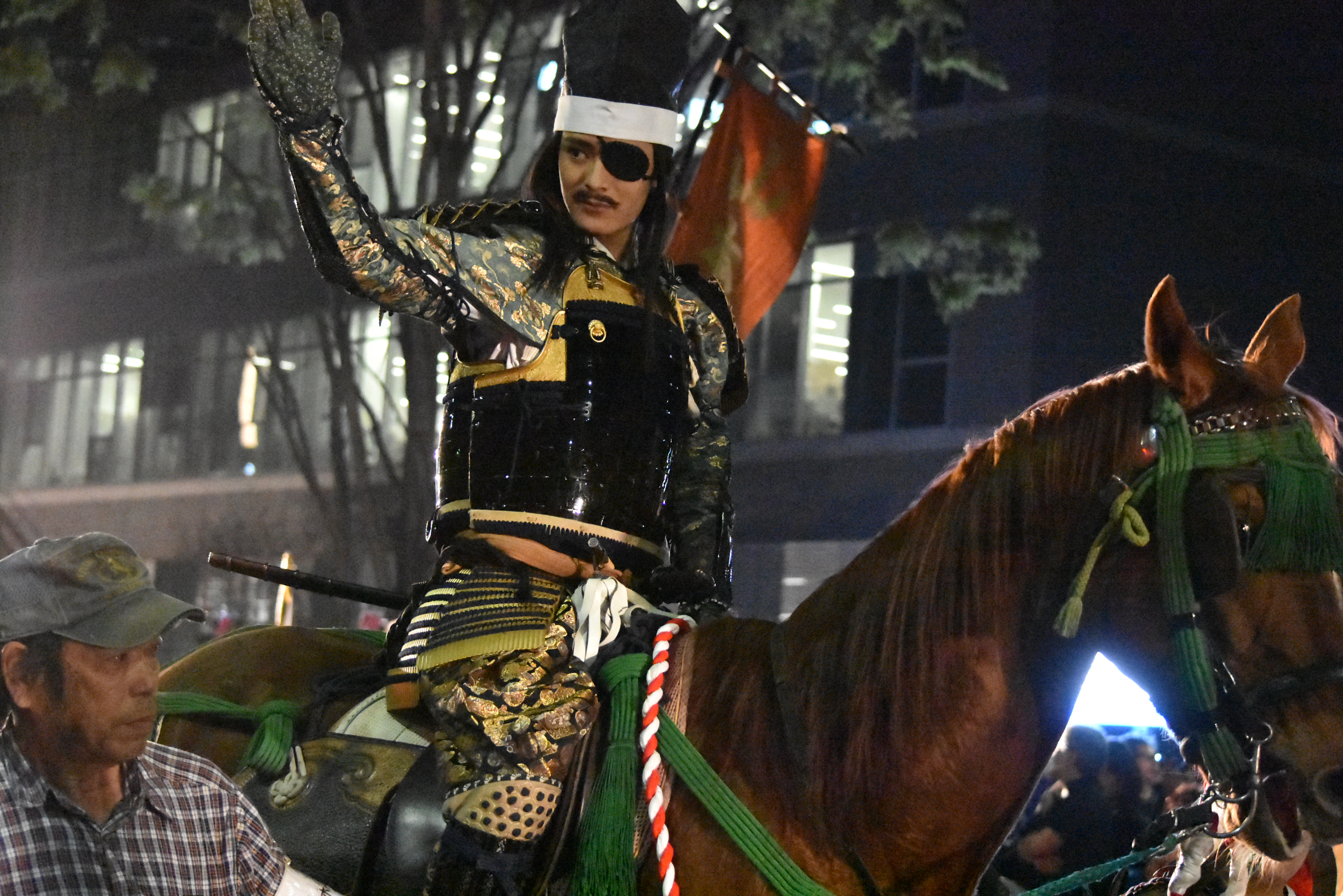 信玄公祭り 塩野瑛久 Nikon D3400